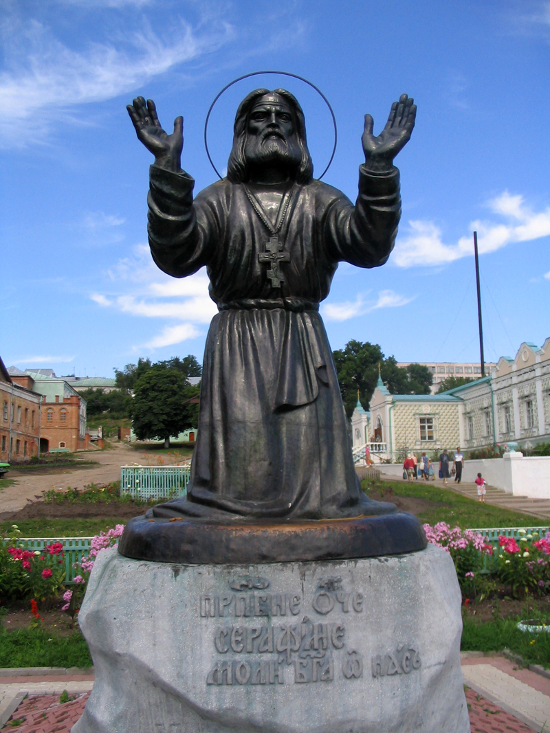 Коренная пустынь. Курская область.Памятник Серафиму Саровскому